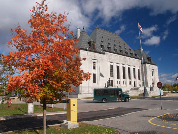 摄影者：守夜者 03:47 2006年1月15日 (UTC)